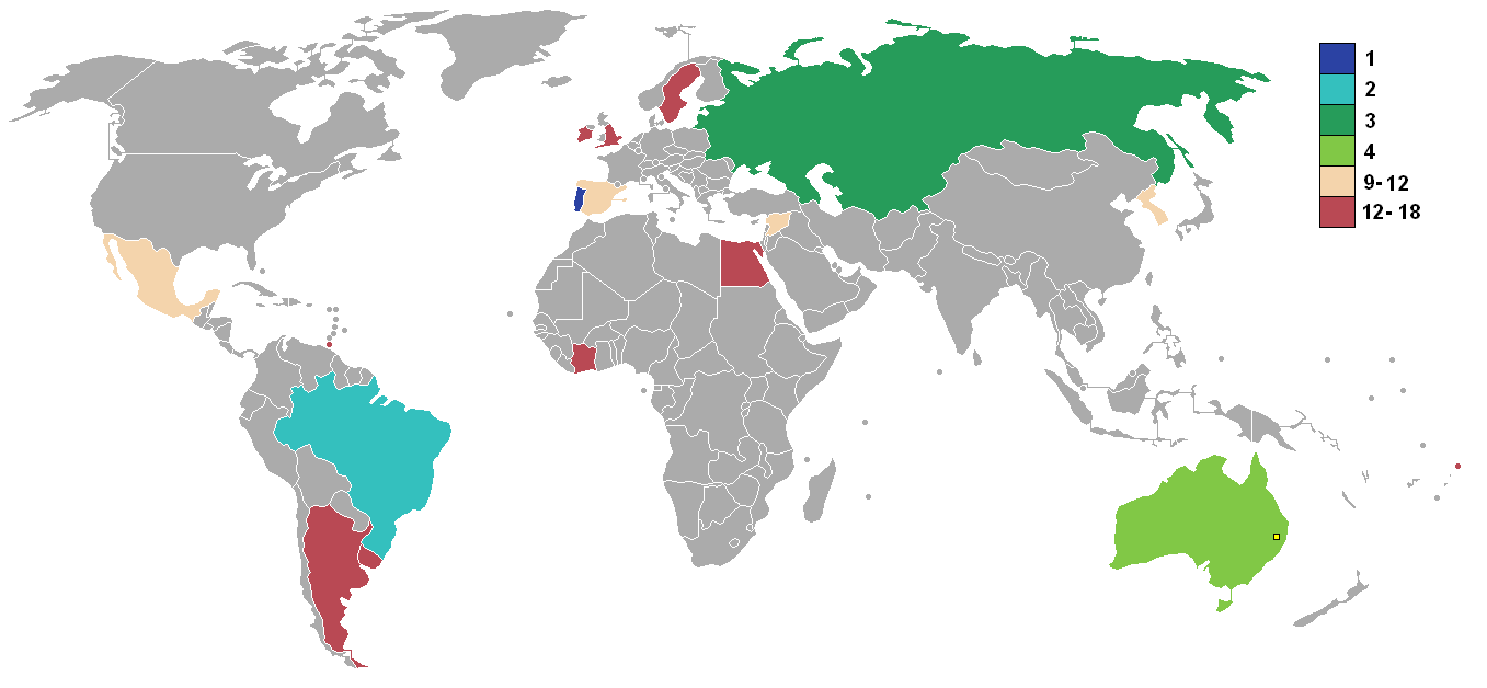 Copa disputada en Portugal